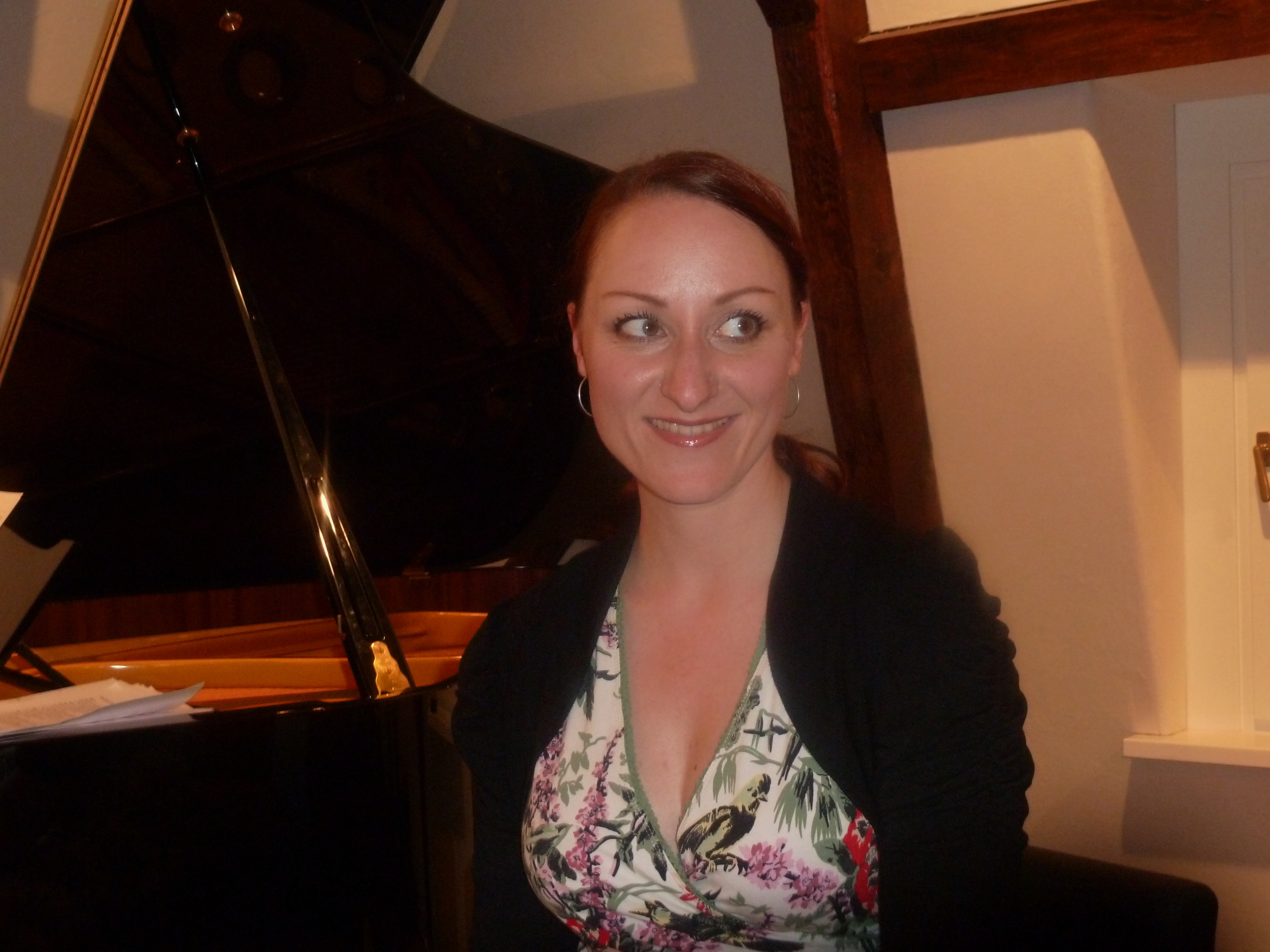 Inga Lühning nach einem Konzert mit Andreas Schnermann und dem Poetry Clan in der Burg Bielstein bei Wiehl